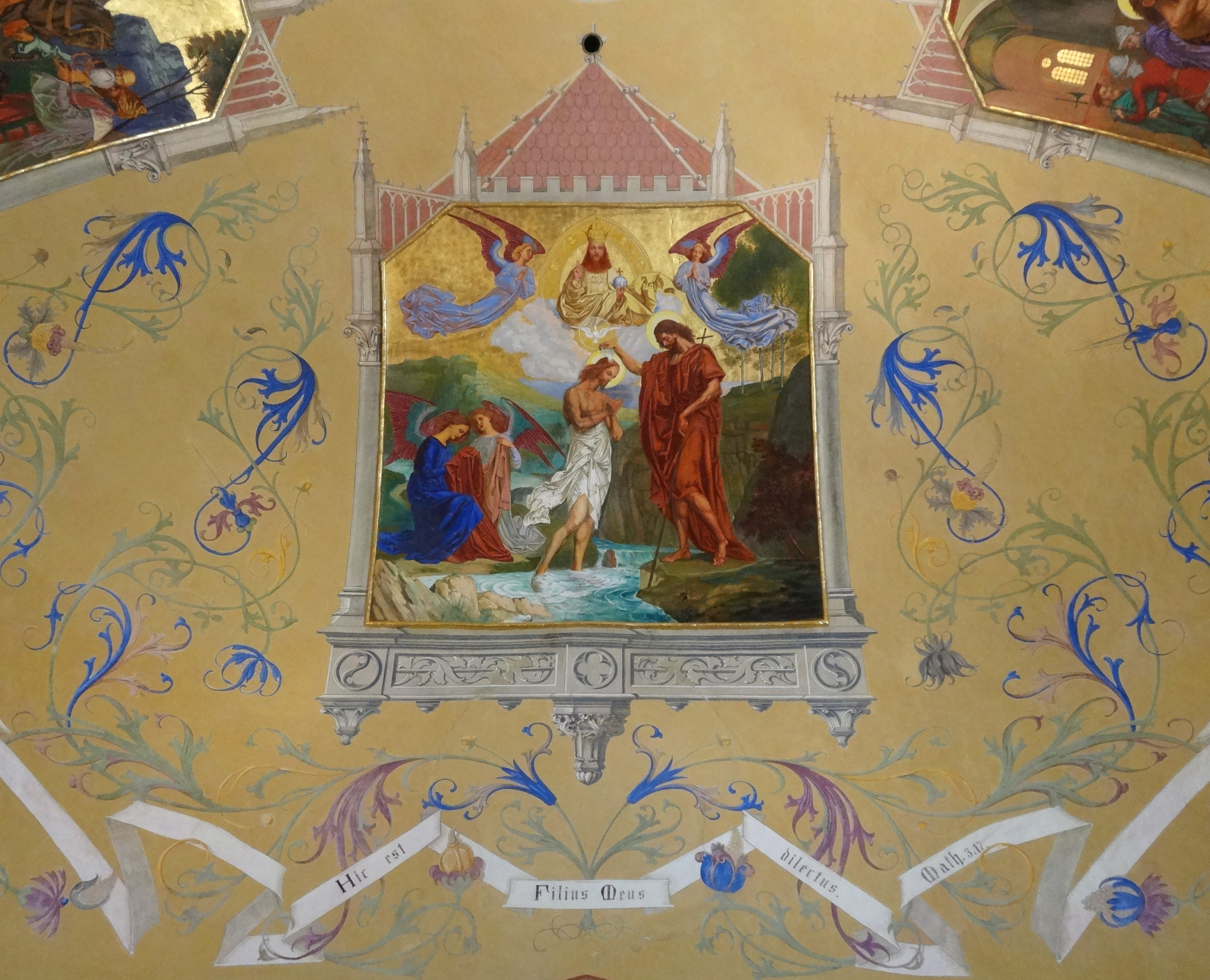 Kath. Filialkirche hl. Johannes der Täufer, Teil des Deckengemäldes: die Taufe Jesu